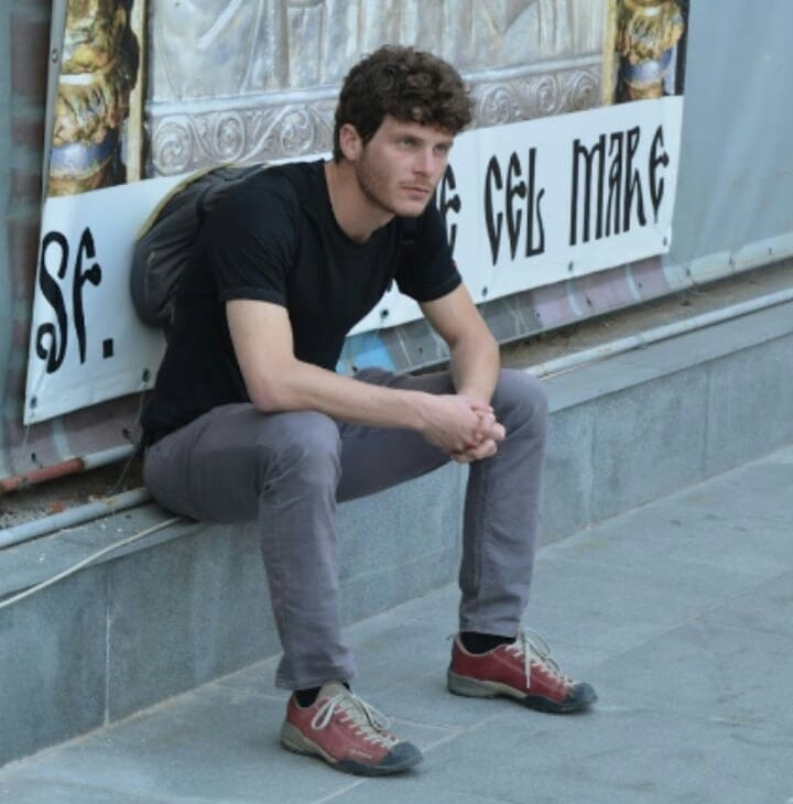 תמונה שצולמה בהודו במסגרת טיול בשנת 2019